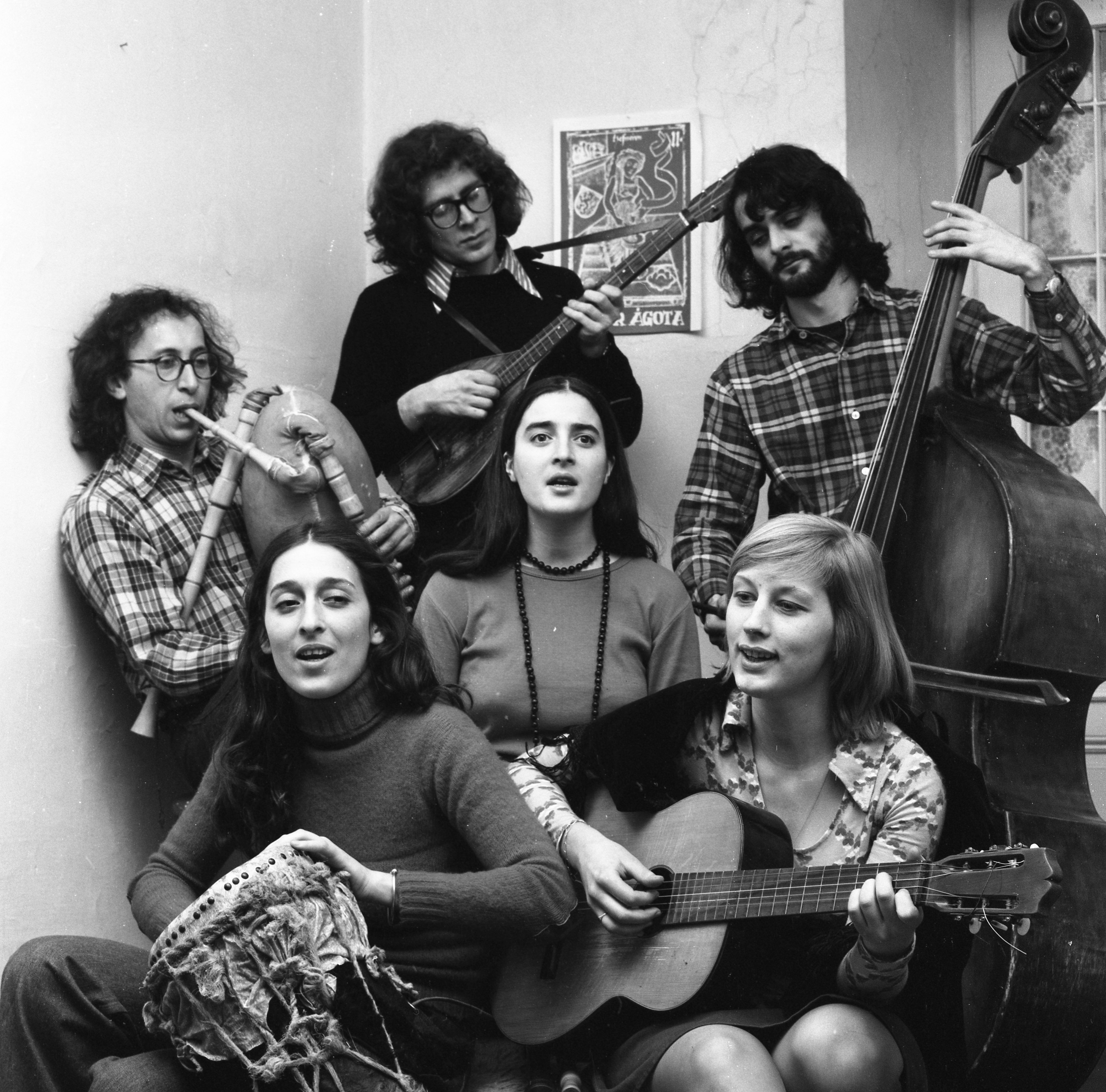 A Kolinda együttes tagjai, előtérben: Zsigmondi Ágnes, Kamondy Ágnes, Kováts Dóra, háttérben: Lantos Iván, Dabasi Péter, Balázs János